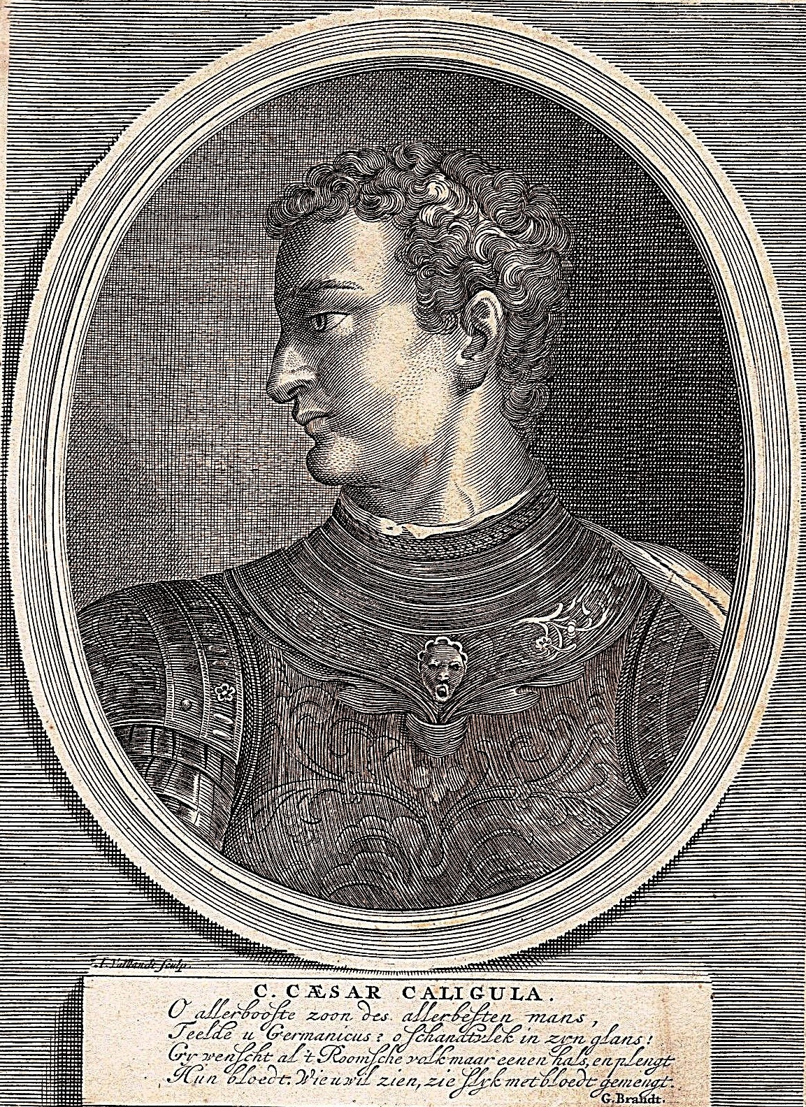 Portrait de Caligula. Gravure contrecollée sur feuille : 18 x 24 cm Caligula (31 août 12 à Antium - 24 janvier 41 à Rome), troisième empereur romain. Il a régné de 37 à 41, et succédé à Tibère. Selon nos principales sources concernant son règne, principalement les récits du biographe latin Suétone et de l'historien grec Dion Cassius, après un début de règne prometteur, durant lequel il connut une grande faveur auprès du peuple romain, il devint peu à peu un empereur autocratique, délaissant et assassinant ceux qui avaient soutenu son ascension, tout en nourrissant une profonde haine pour le Sénat.Caligula meurt à Rome en 41, assassiné par un groupe de prétoriens.